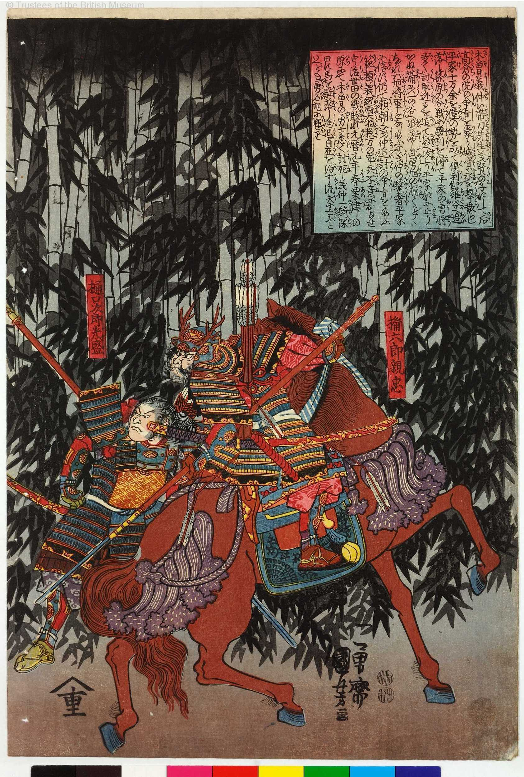 楯六郎親忠 樋口次郎光盛